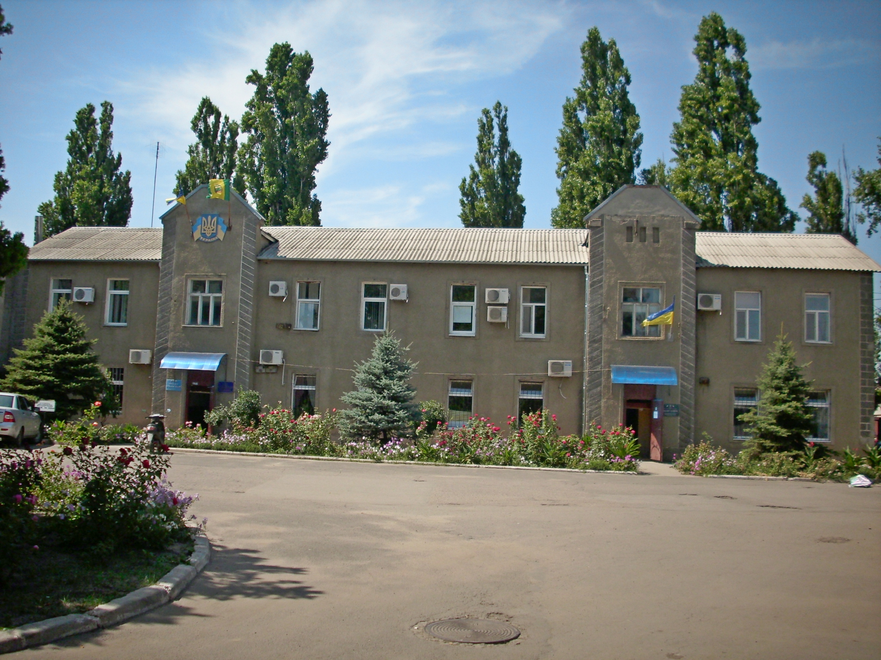 Будівля Роздільнянської міської ради та РАЙВНО